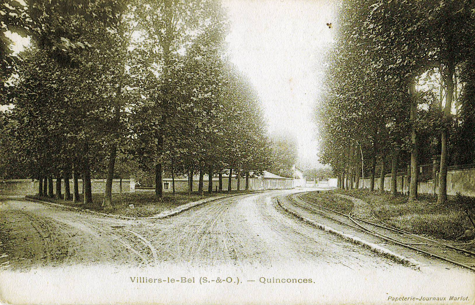 Carte postale ancienne éditée par "Papèterie-journaux Marlot" VILLIERS-LE-BEL - Quinconces Vue de l'évitement du Tramway de Villiers-le-Bel